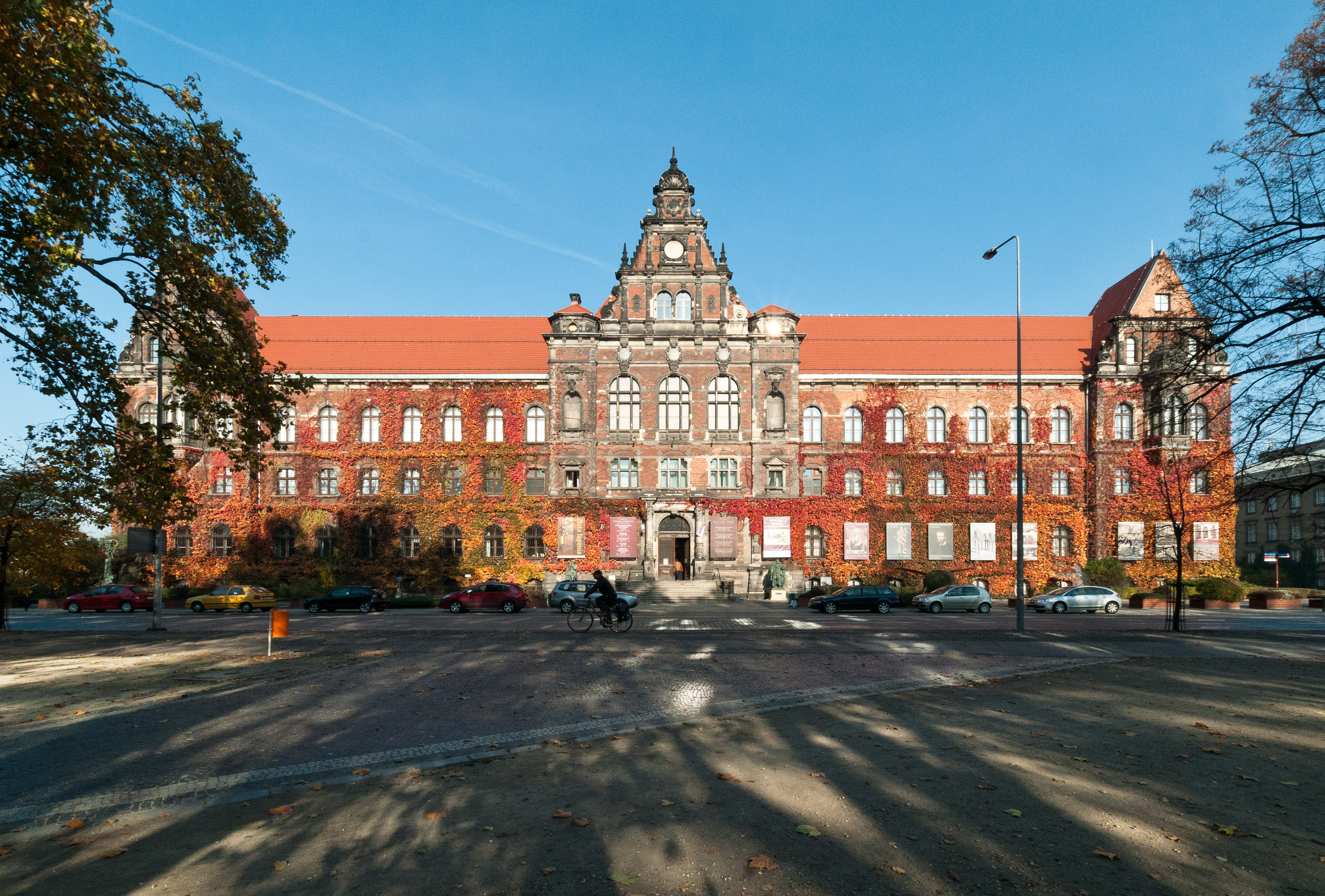 Muzeum Narodowe, Wrocław